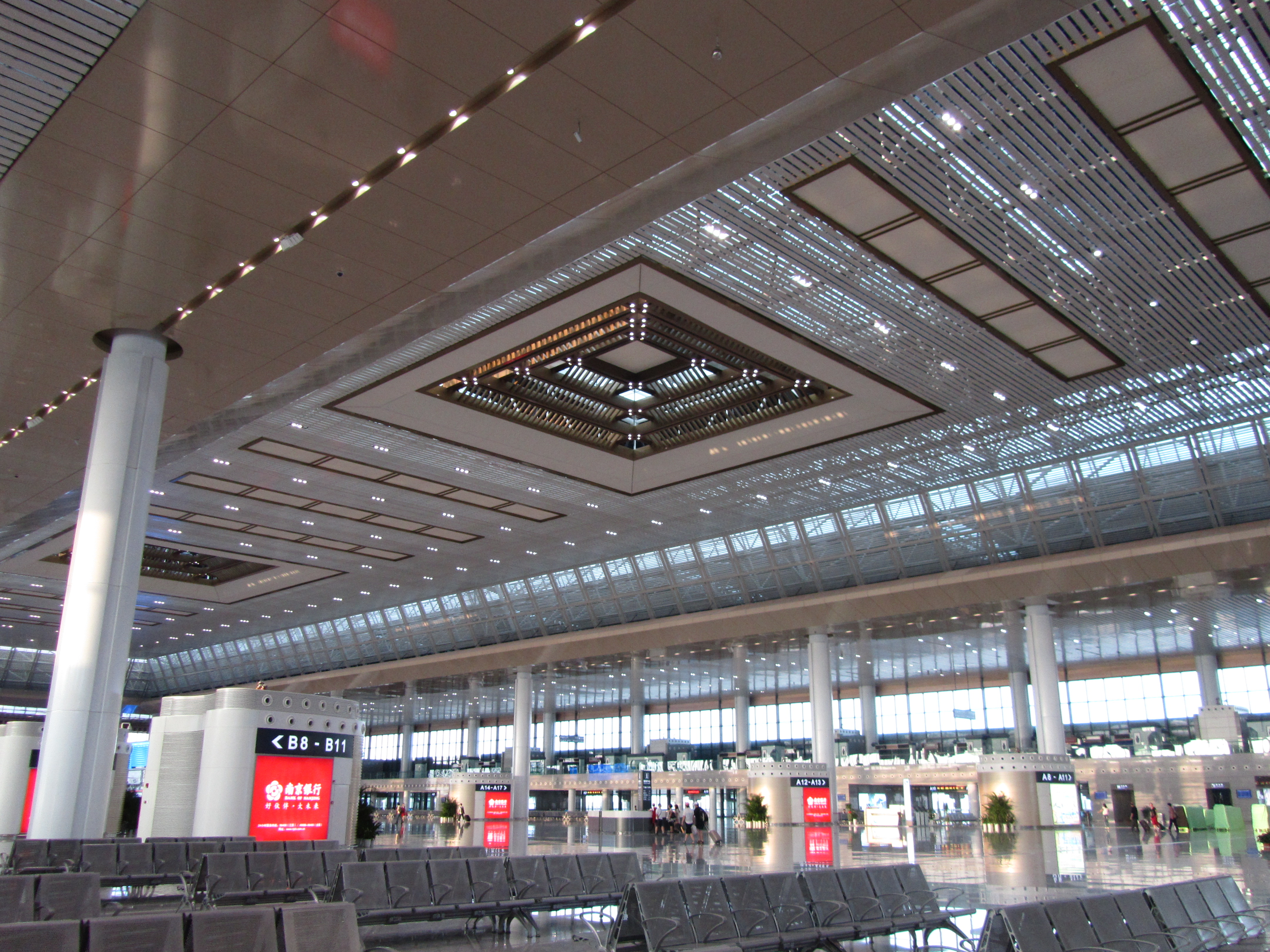 清晨的南京南站室内。